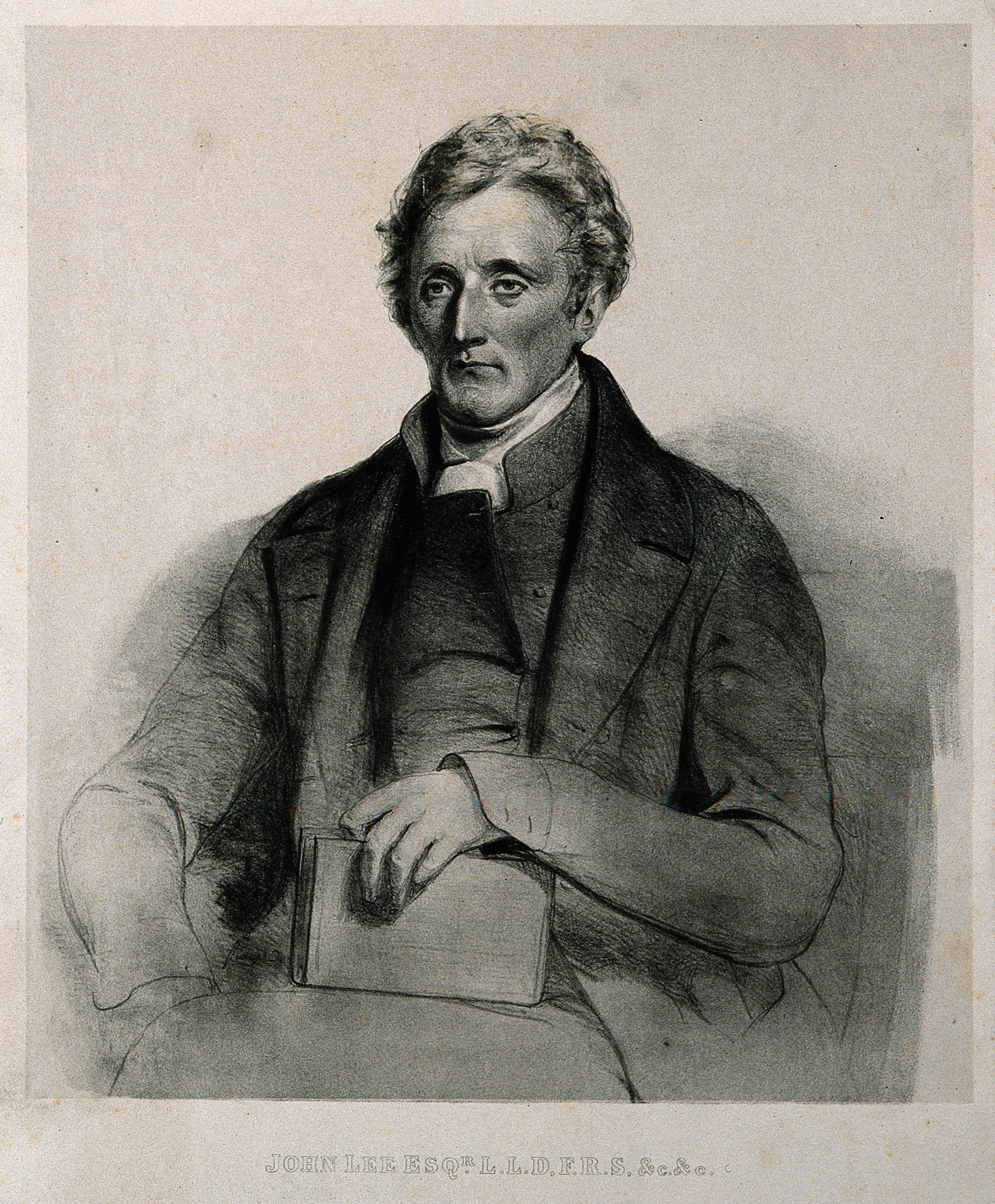 Genre/Technique: Portrait prints. Lithographs. Subject name: Lee, John, 1783-1866.